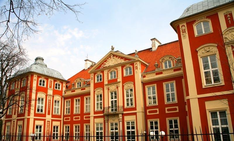 Warszawa (Polska)